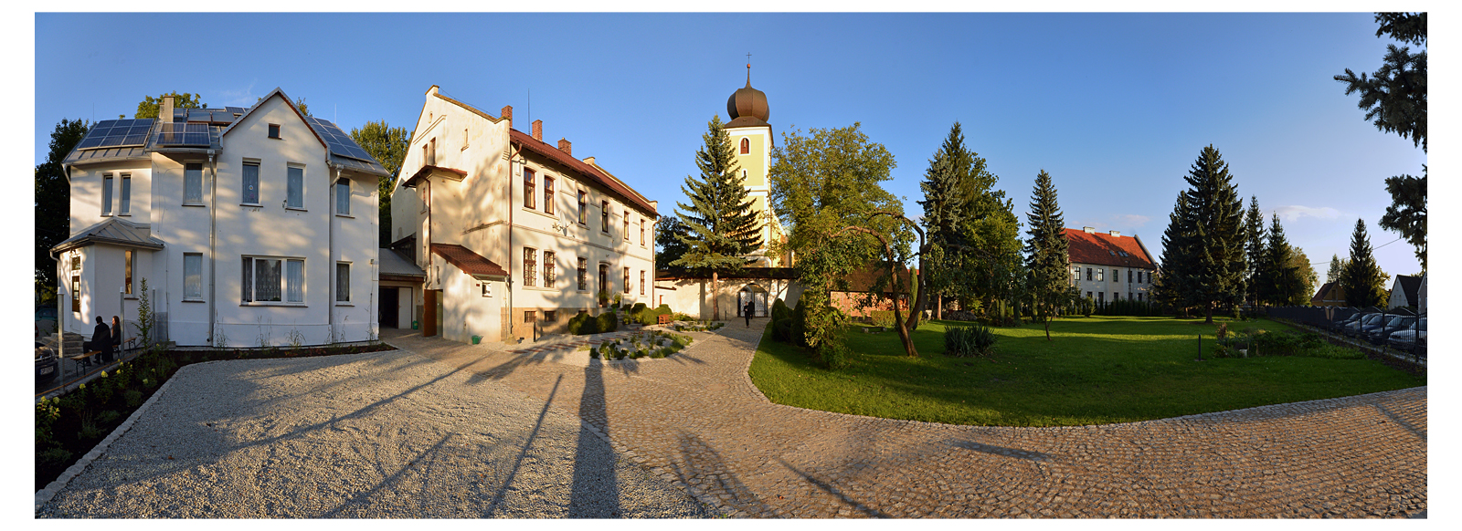 Krosnowice (deutsch Rengersdorf), Panorama